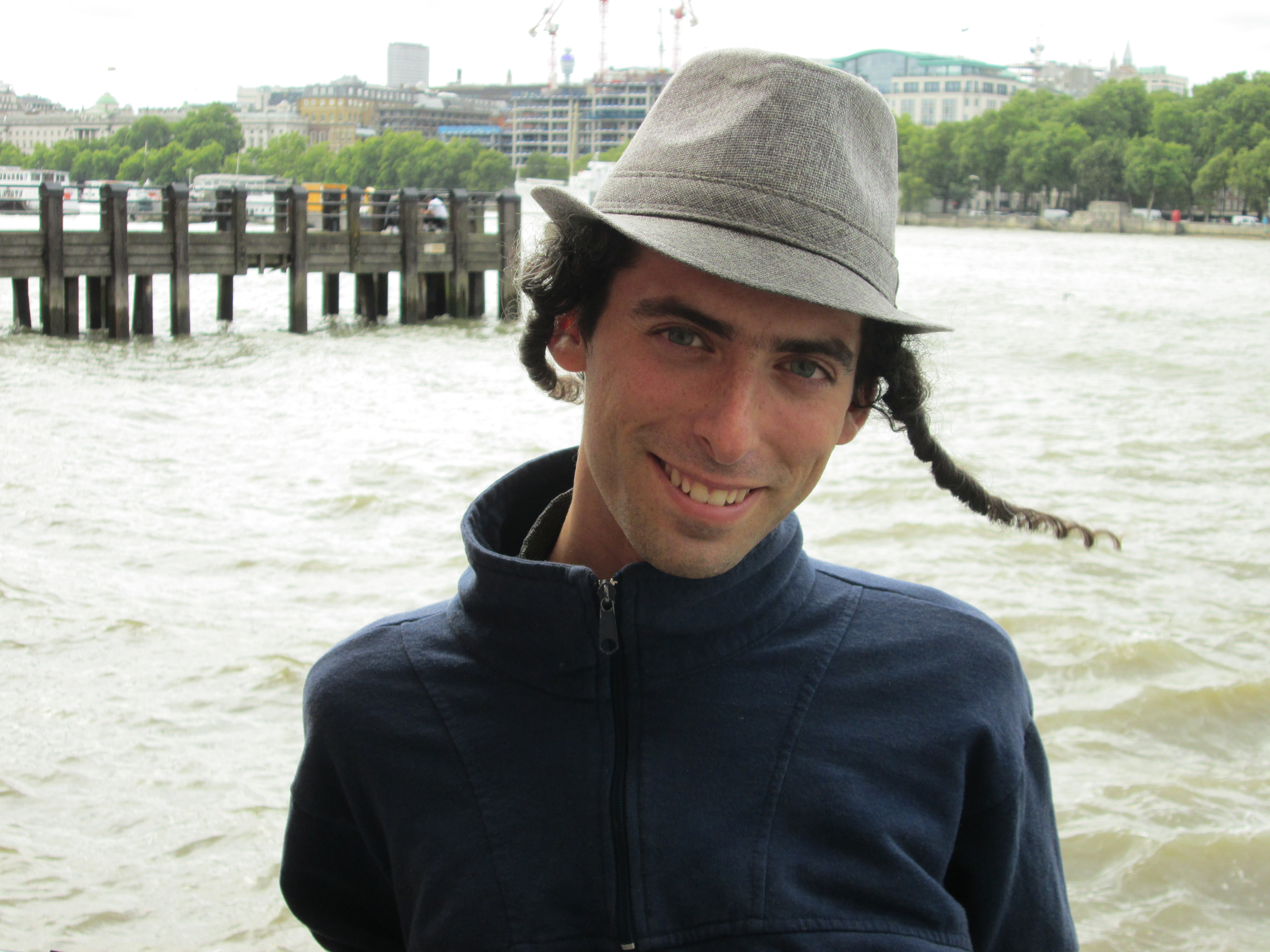 תמונה של חיים בזמן ביקור בלונדון למטרת מתן קונצ'רטים בקהילה היהודית.